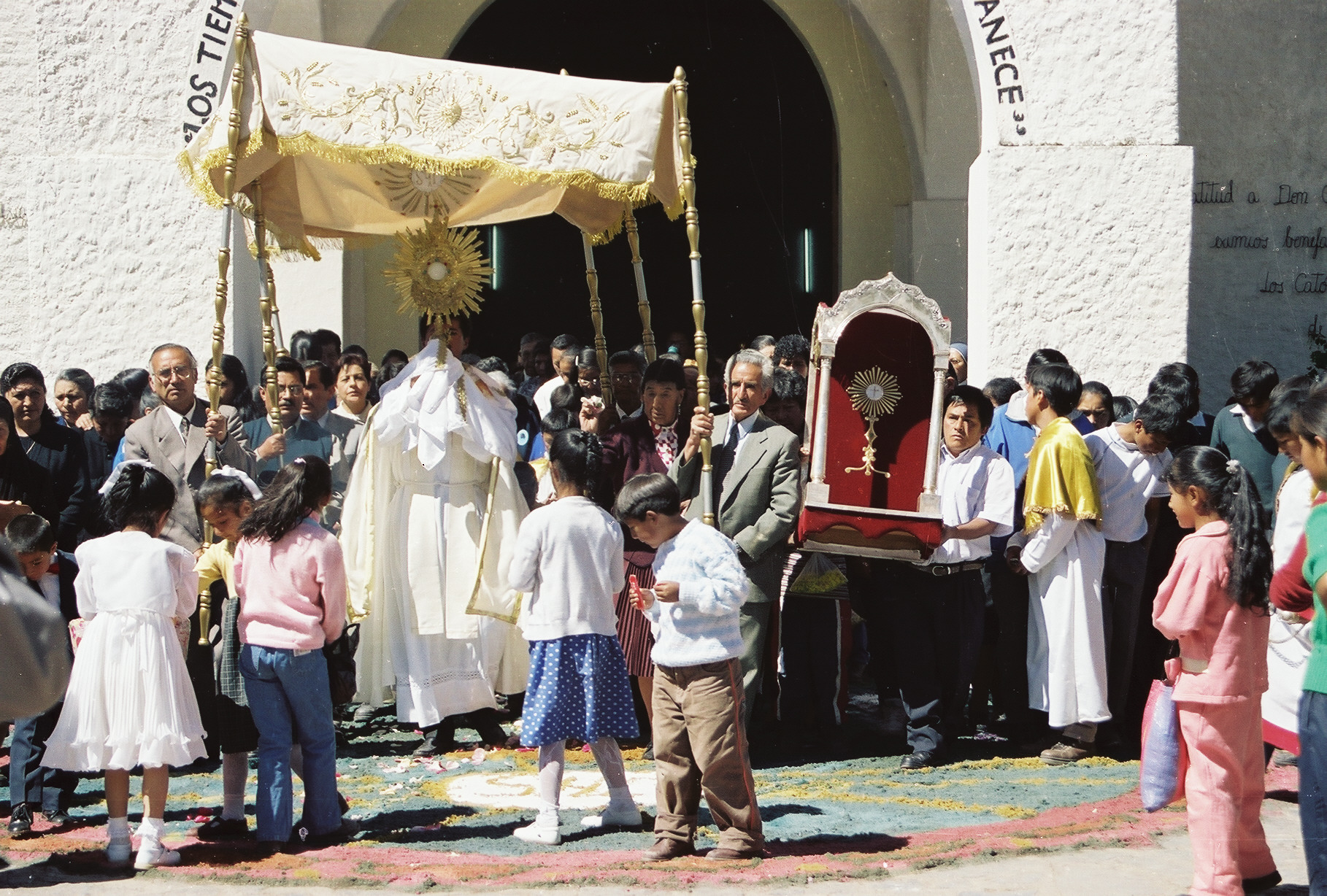 Corpo Christi Feier in Chiquian/Peru 2001 von Uta Freund